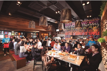 BBQ 프리미엄카페(서울 문정동)